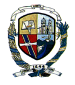 Escudo del municipio de Ures, Sonora, Mexico